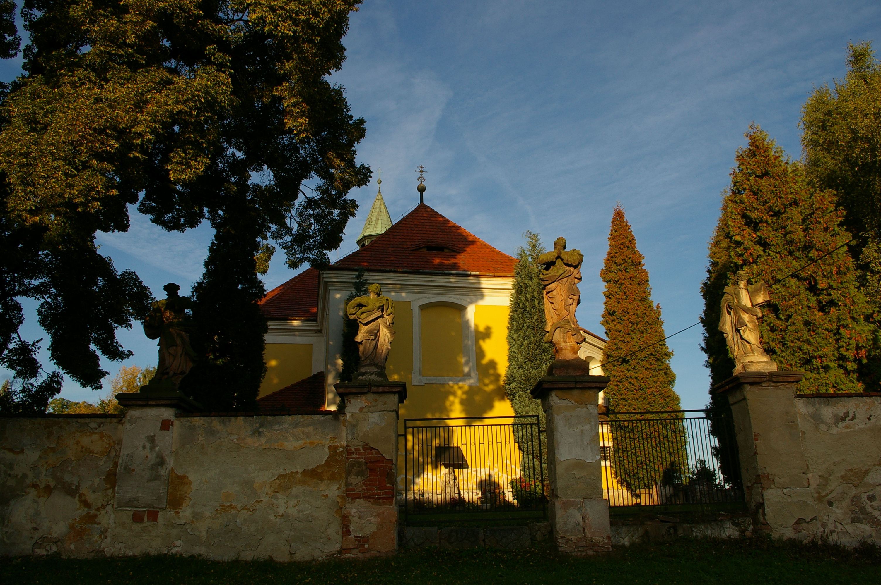 Kostel sv. Petra a Pavla (Jesenice), SZ část vsi, Jesenice